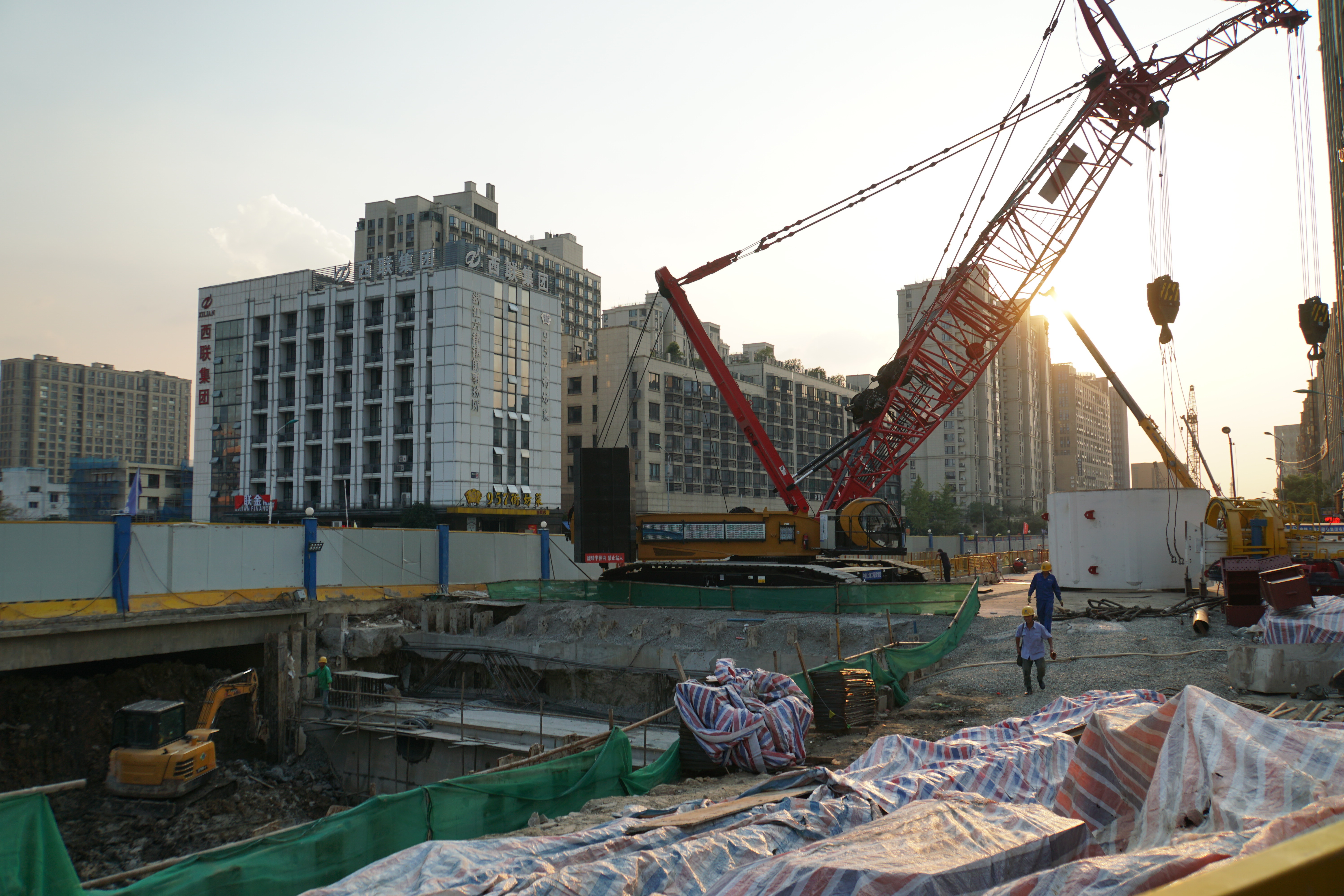 西文街站工地，2018年9月28日